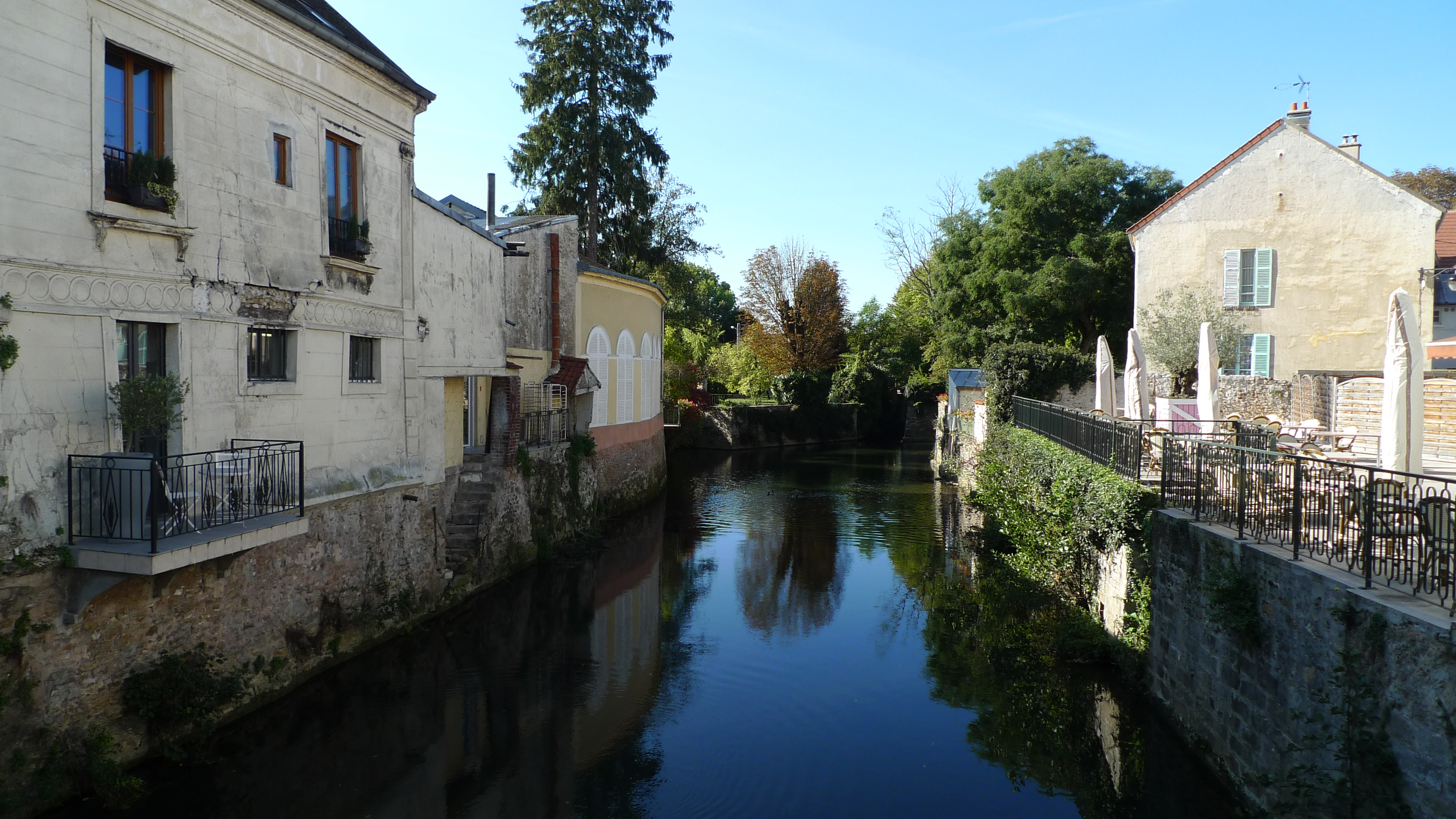 Le Grand Morin à Coulommiers